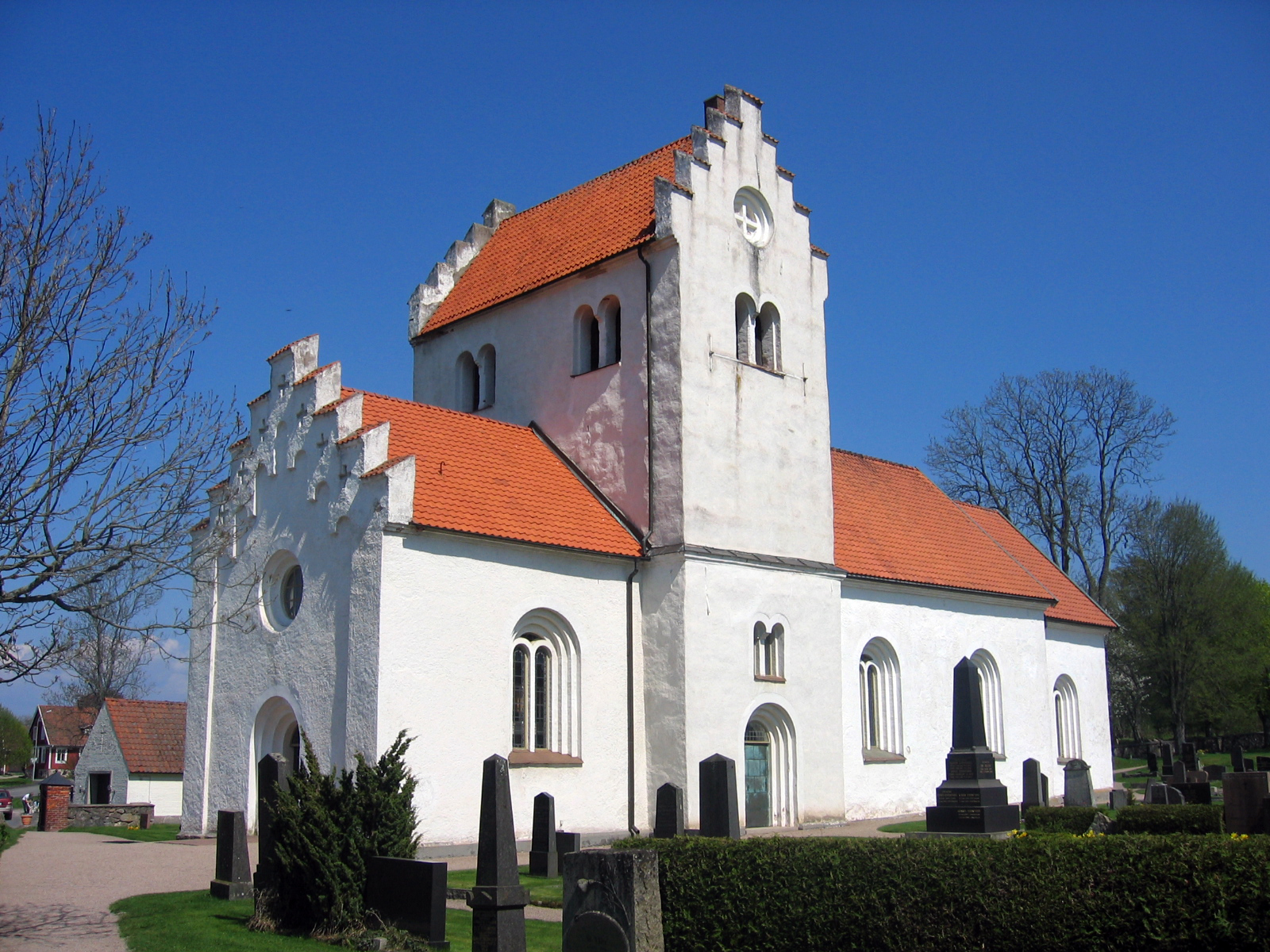 Hästveda kyrka exteriör Foto: Fantomen